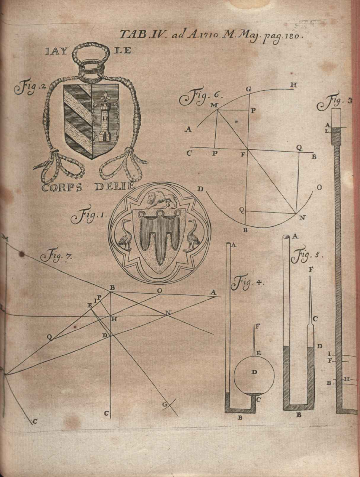 Illustration